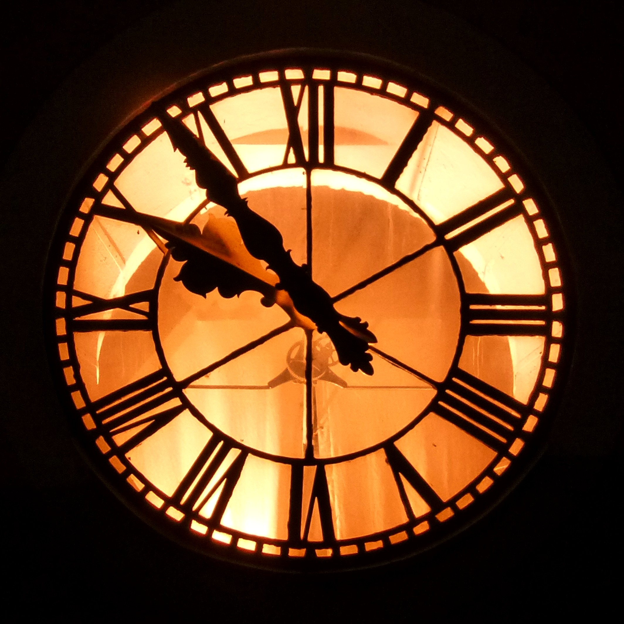 Maria Magdalena kyrkans tornur på natten